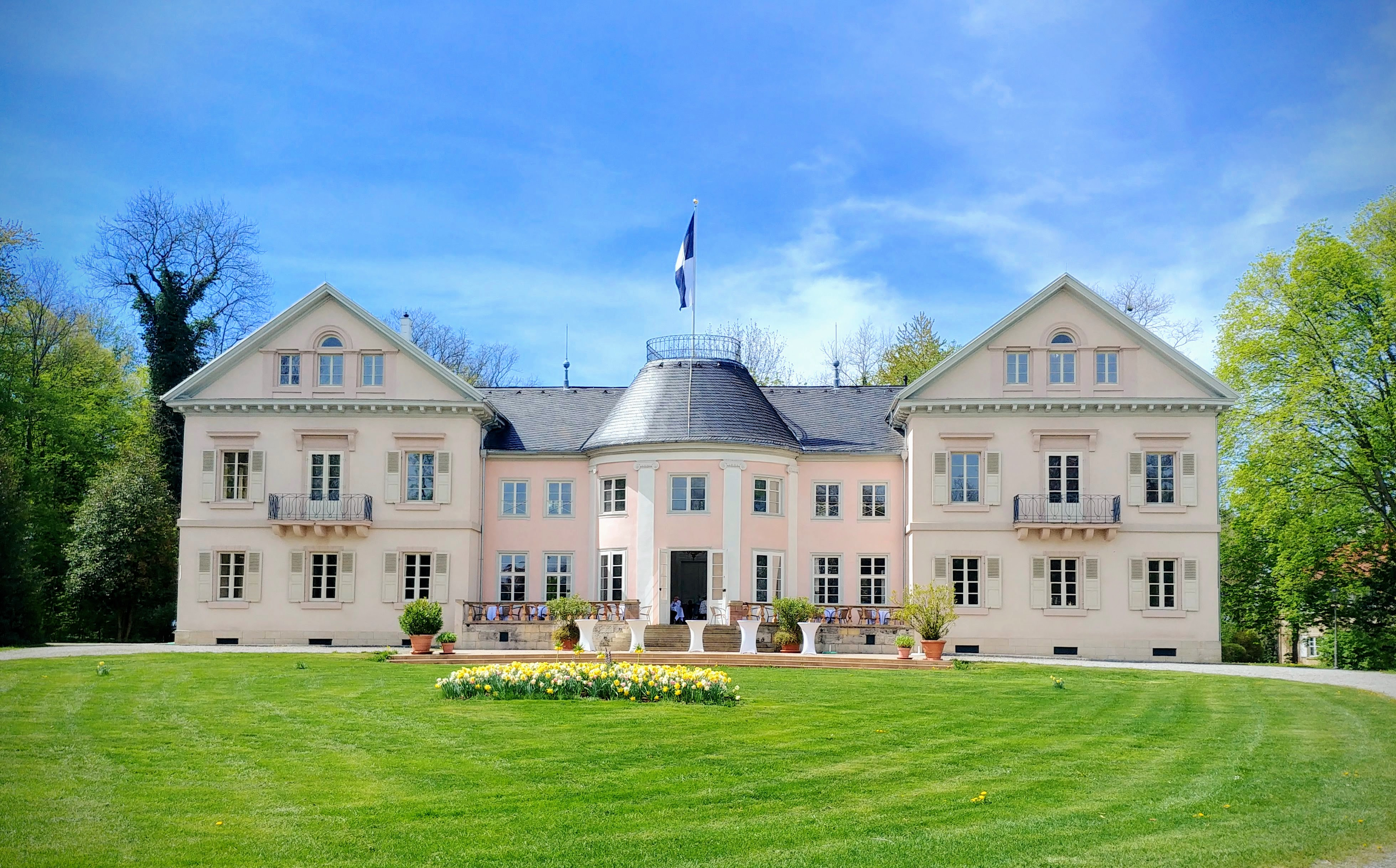 Villa Eugenia, frontal fotografiert aus dem Hechinger Fürstengarten.